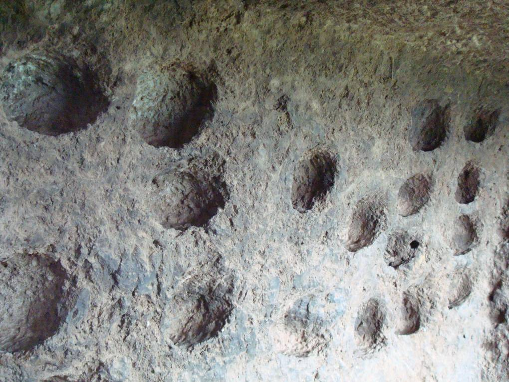 Site des grottes troglodytique de Jonas en Auvergne, détail des "boulins", trous pour les pigeons.